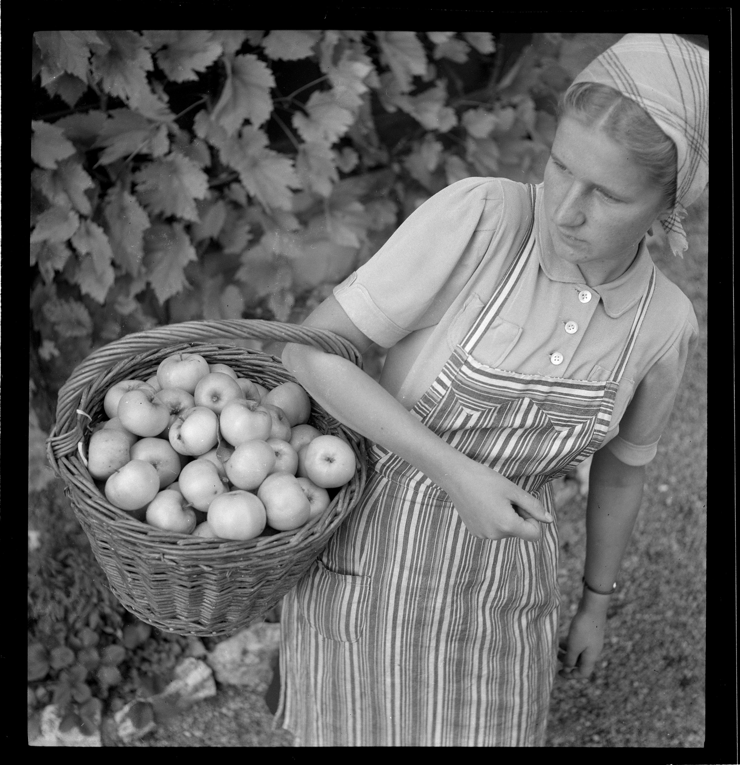 Apfelernte im Korb (1944)